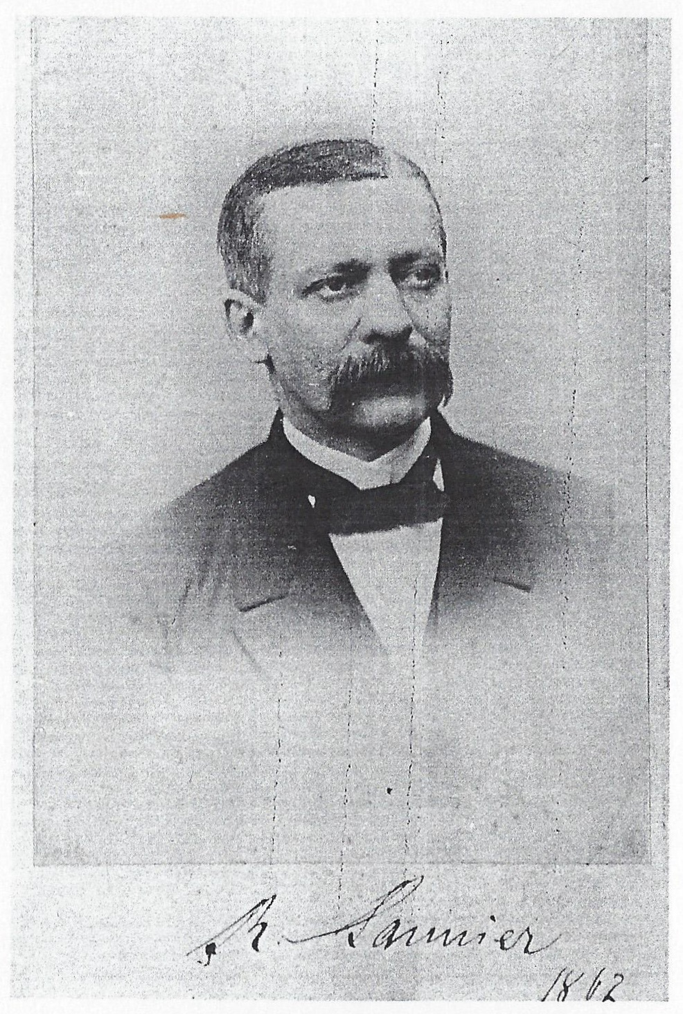 Porträtfotografie von Rudolf Pannier (1821-1897)